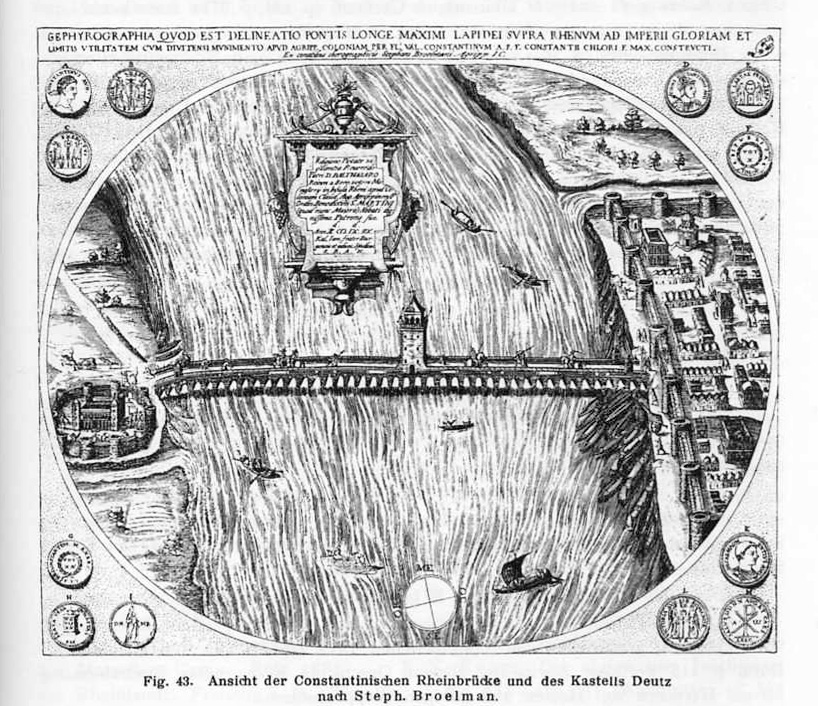 Darstellung der Konstantinbrücke im römischen Köln nach Stephan Brölmann. Titelangabe: „De ponte Constantiniano observationes ex Broelmanno“.